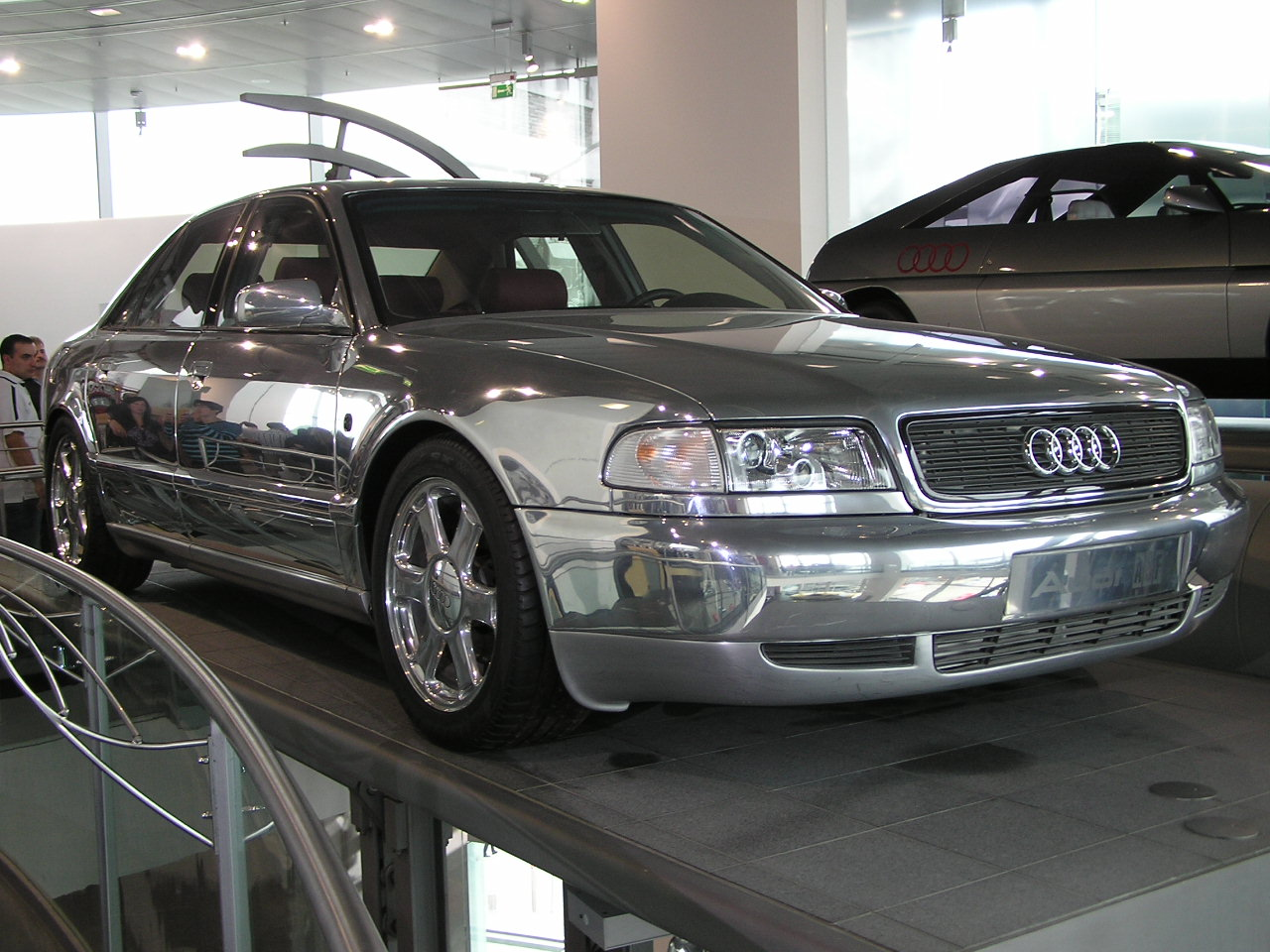 Audi Space Frame Concept Car, mit einer Vollaluminiumkarosserie